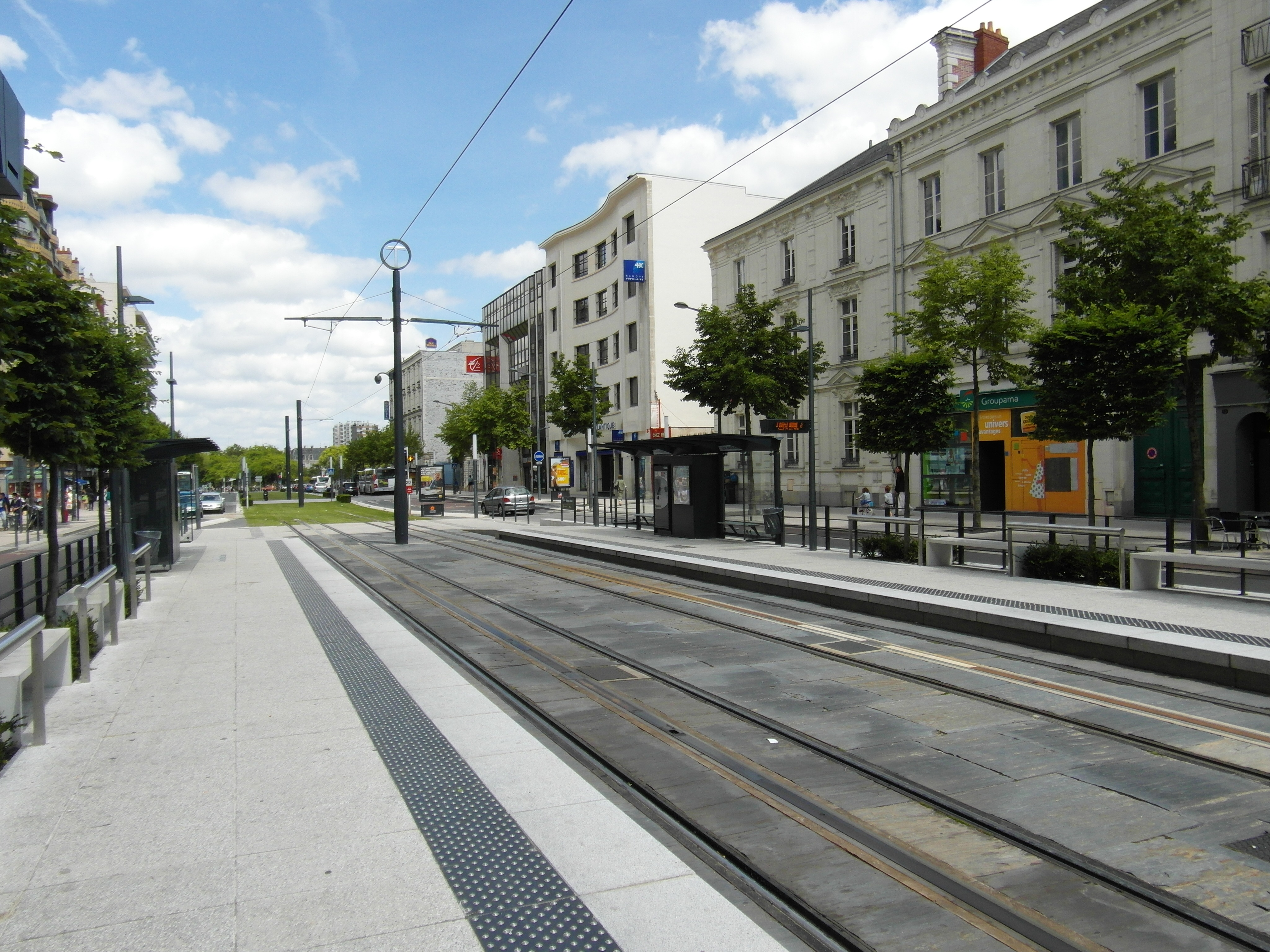 Straßenbahn Angers - Städtebauliche Integration im Bereich Gares (Bahnhöfe), Boulevard du Maréchal Foch und Rue d'Alsace